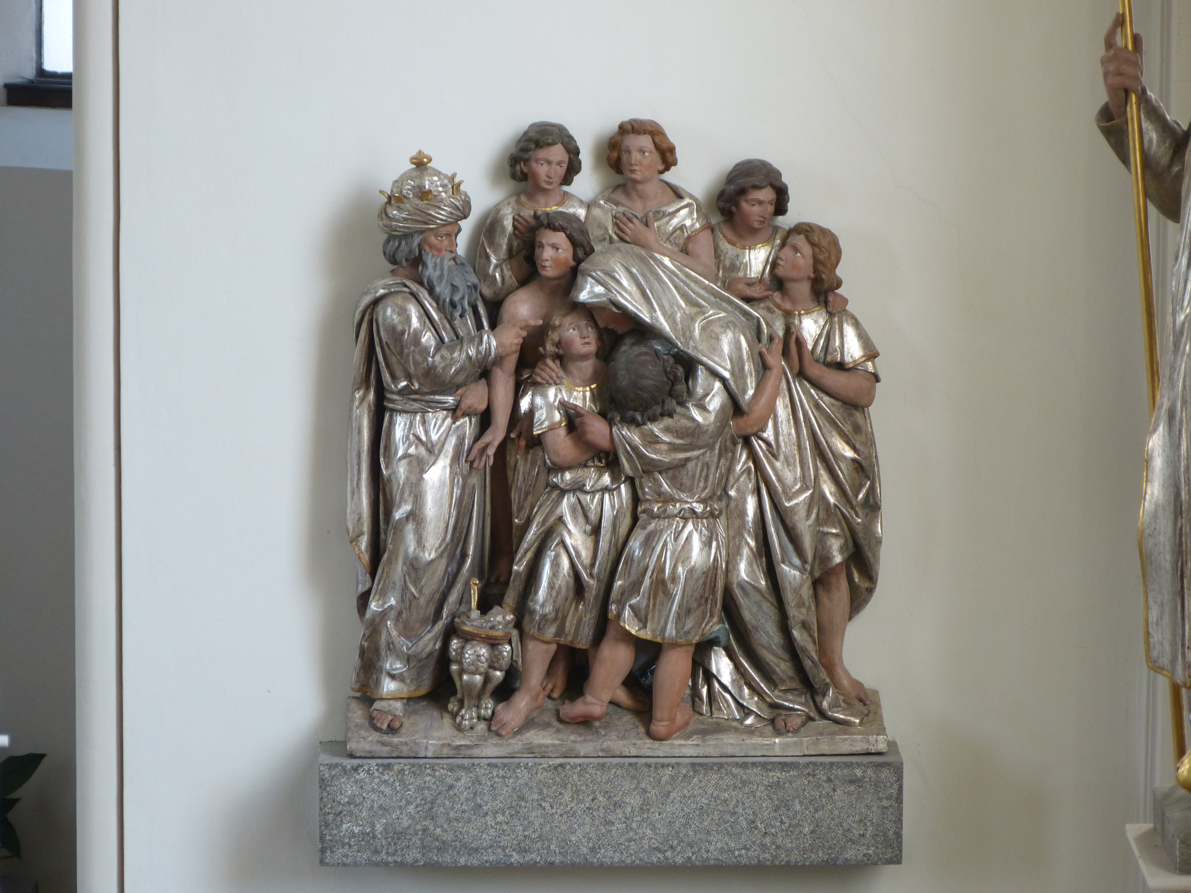 Heilige Sieben Brüder, Unterrieden, Landkreis Unterallgäu, Bayern